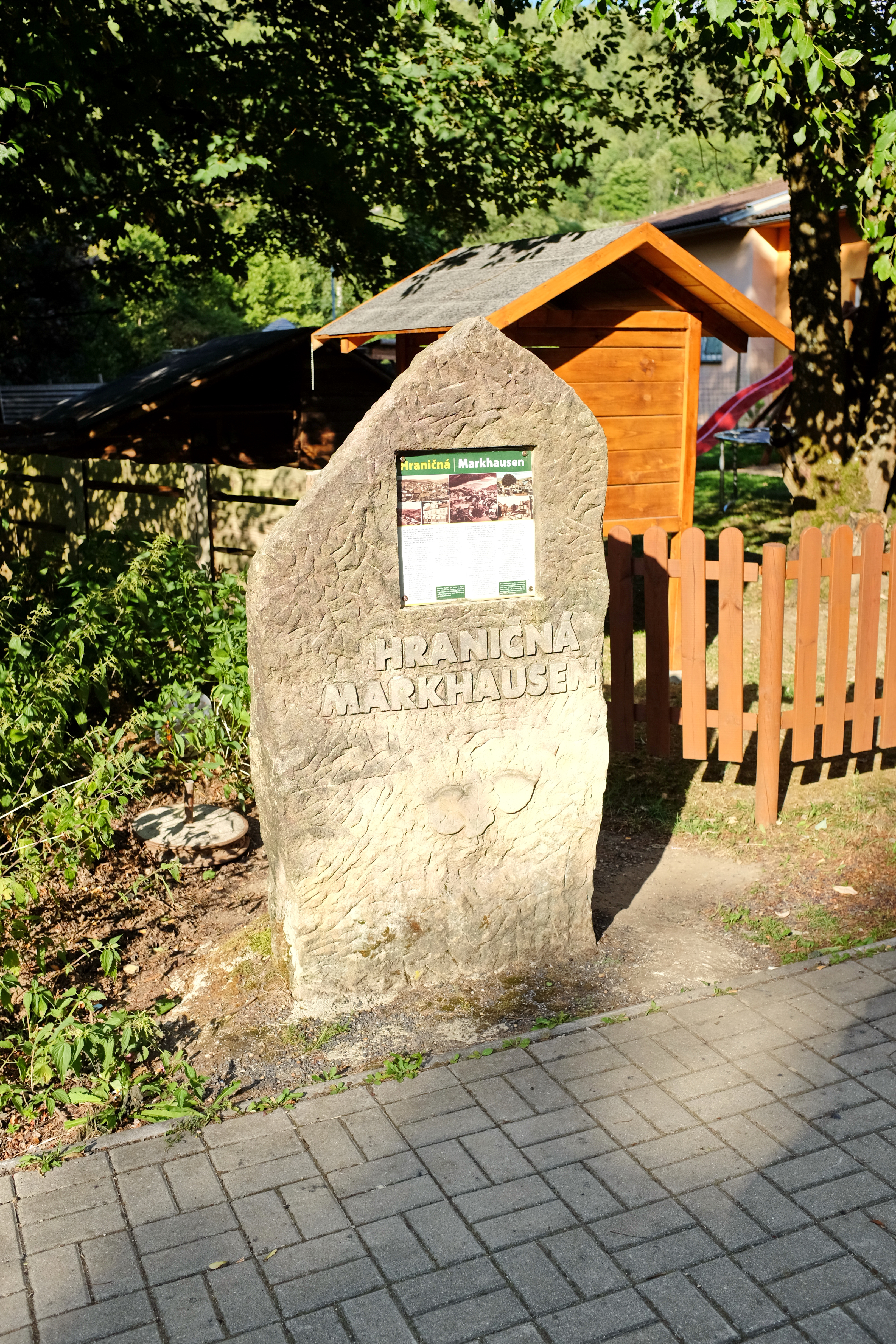 Hraničná, zaniklá obec, místní část města Kraslice, pomník zaniklé obce, okres Sokolov